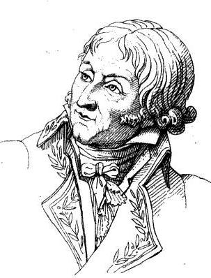 Jean-François Cailhava de L'Estandoux.